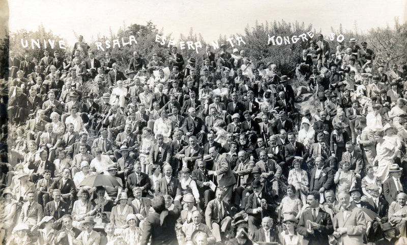 19. Esperanto-Weltkongress, Danzig 1927. Massenfoto der Teilnehmer